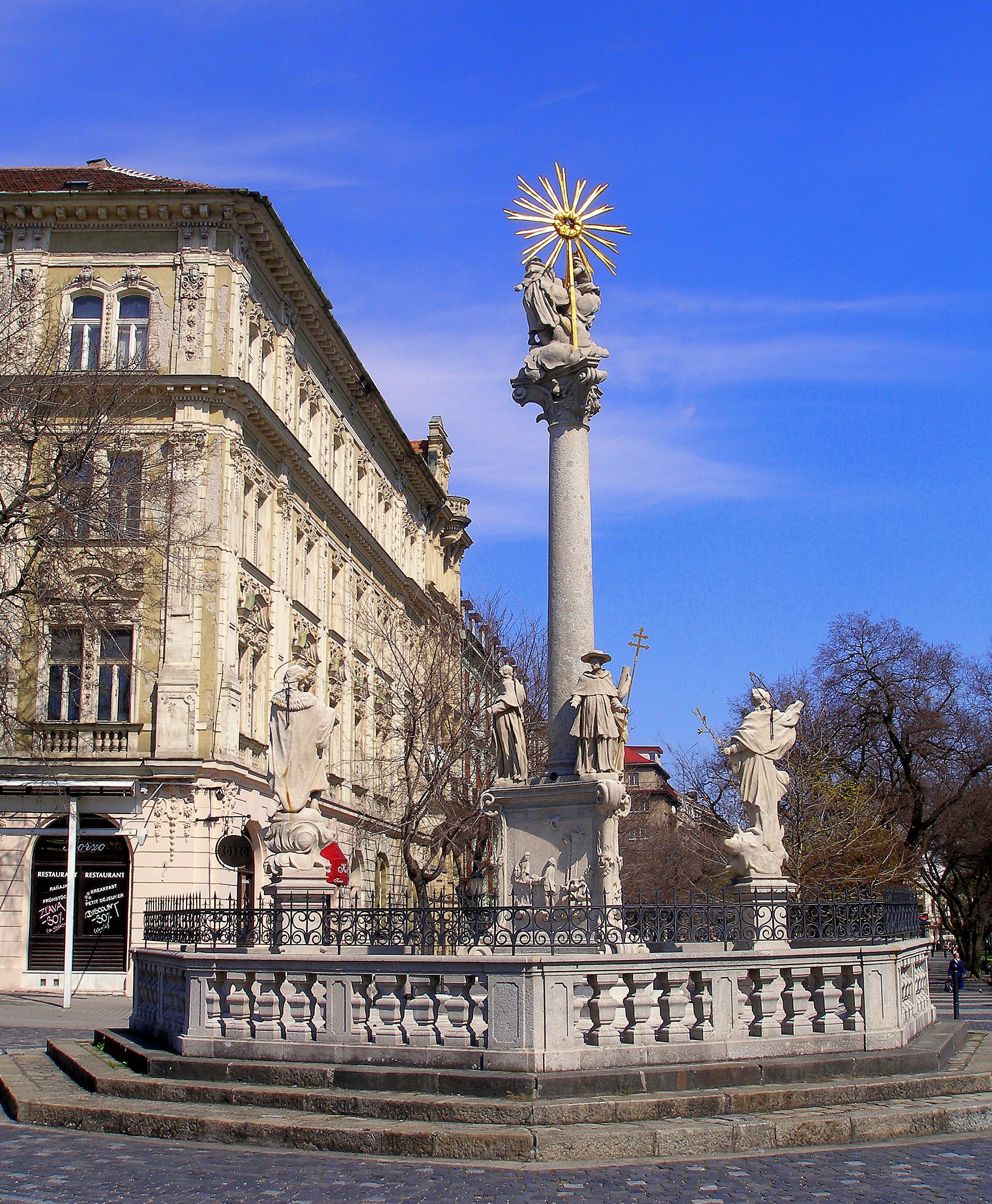 Bratislava Rybné námestie na Bielu sobotu.